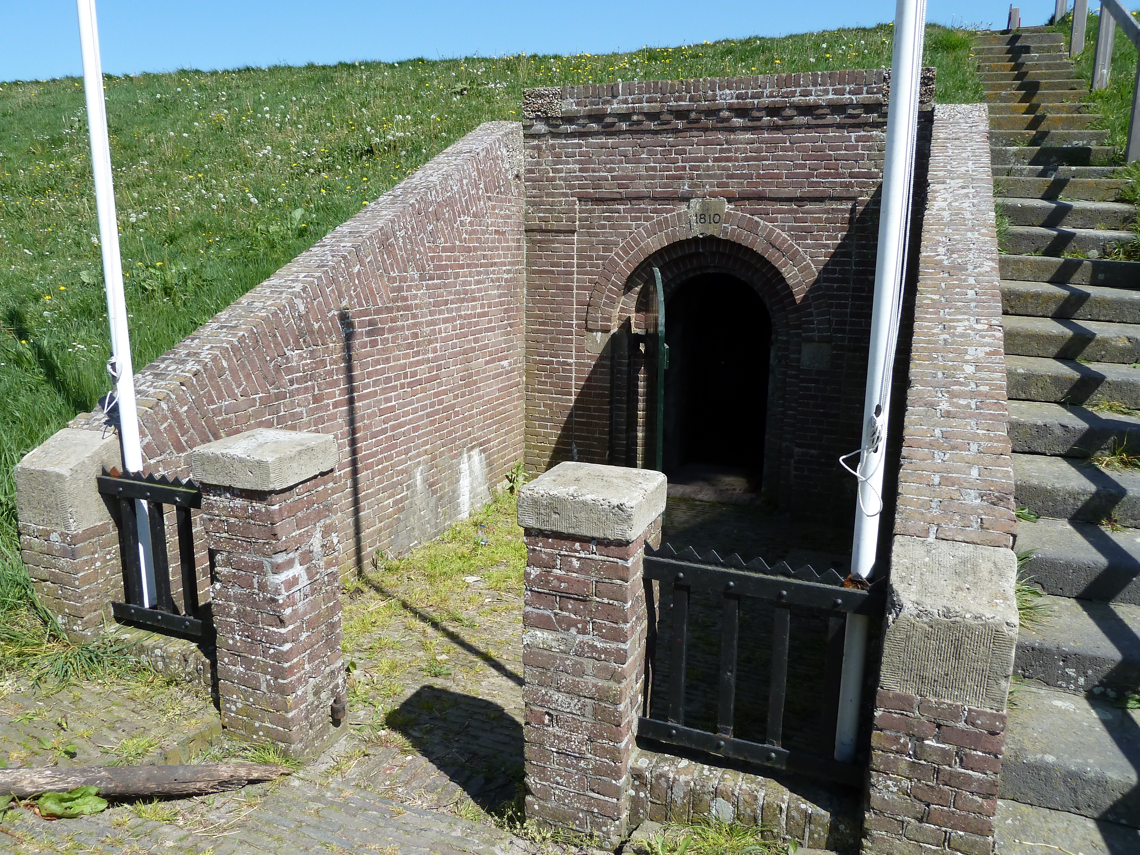 Het voormalige kruitmagazijn van Oostmahorn. Gebouwd in 1810, gerestaureerd in 1922.